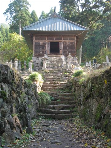 Fukushima Masanori(1561 – 1624) grave. 長野県上高井郡小布施町の曹洞宗梅洞山岩松院境内にある戦国武将福島正則の霊廟。